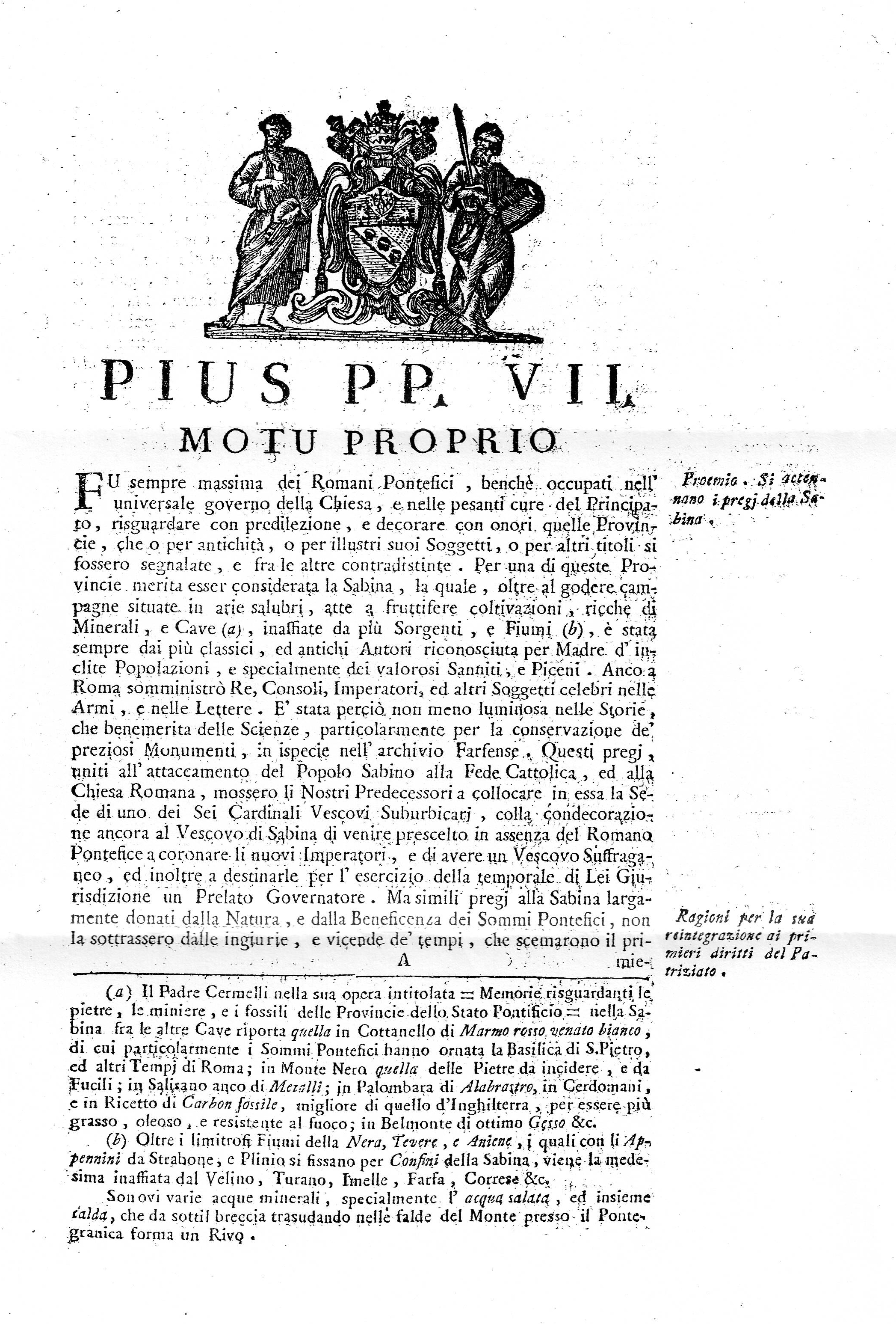 Motu Proprio, Pope Pius VII